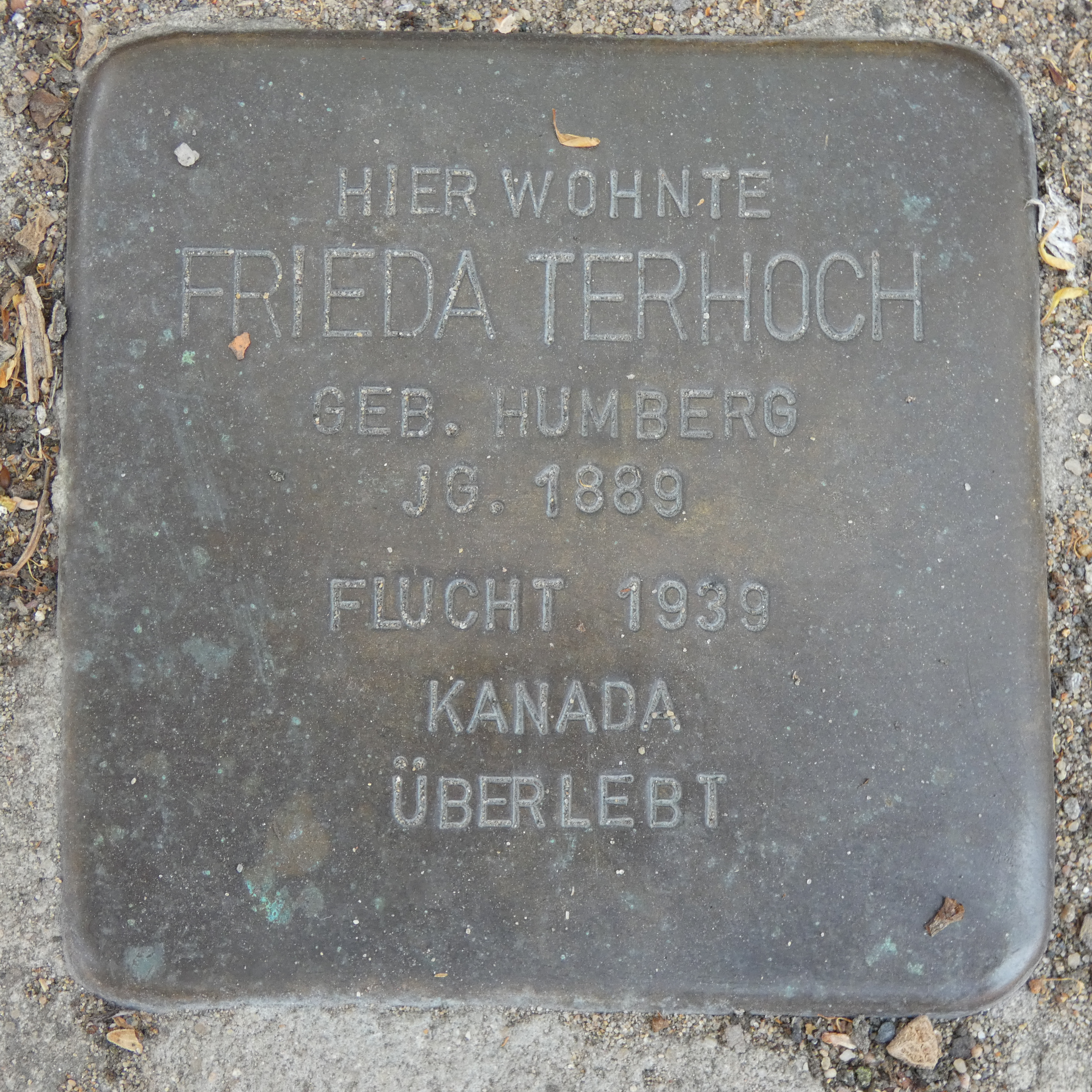 Hier wohnte Frieda Terhoch geb. Humberg, Jg. 1889, Flucht 1939 Kanada, überlebt